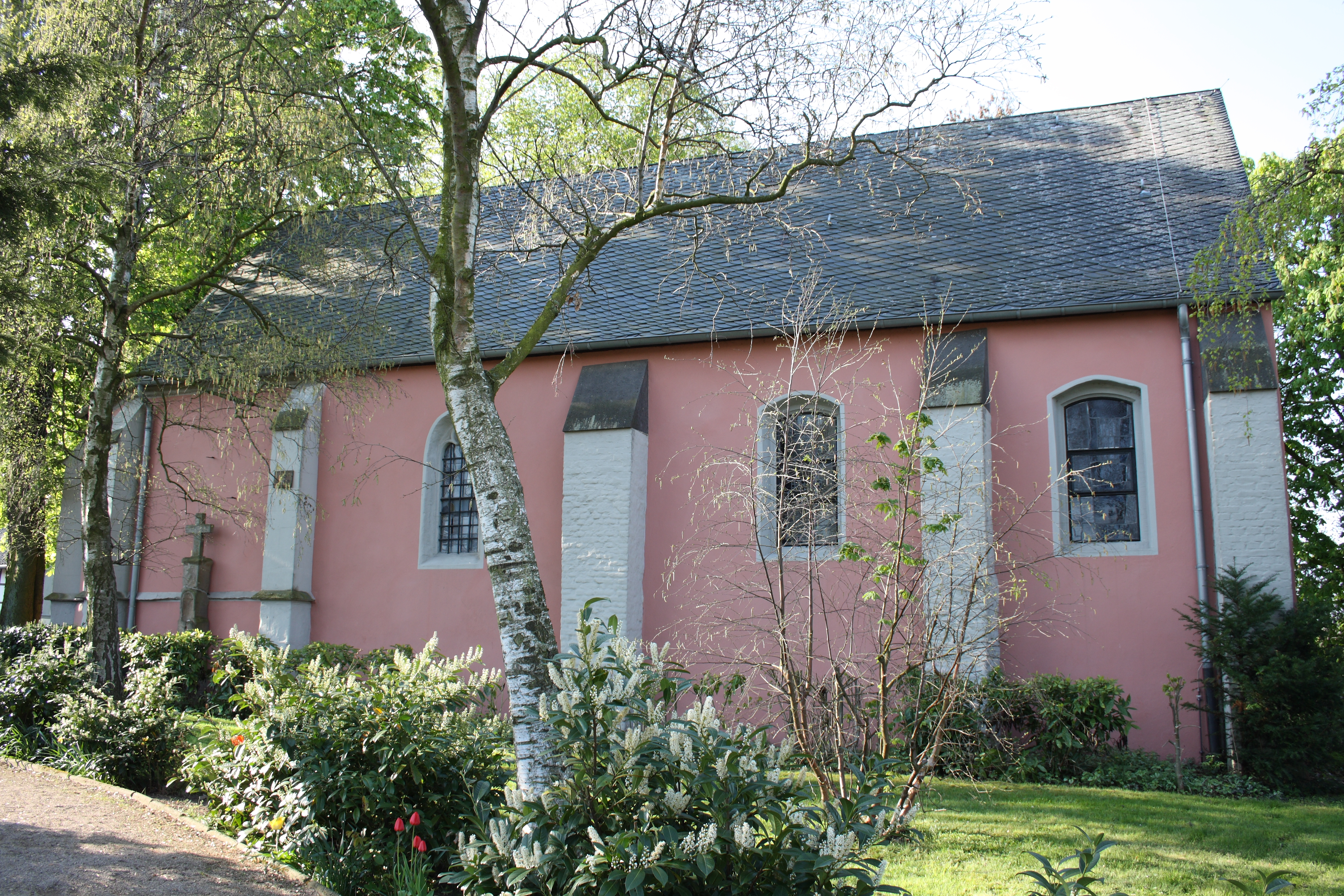 alte Kirche St. Johann Baptist in Niederberg